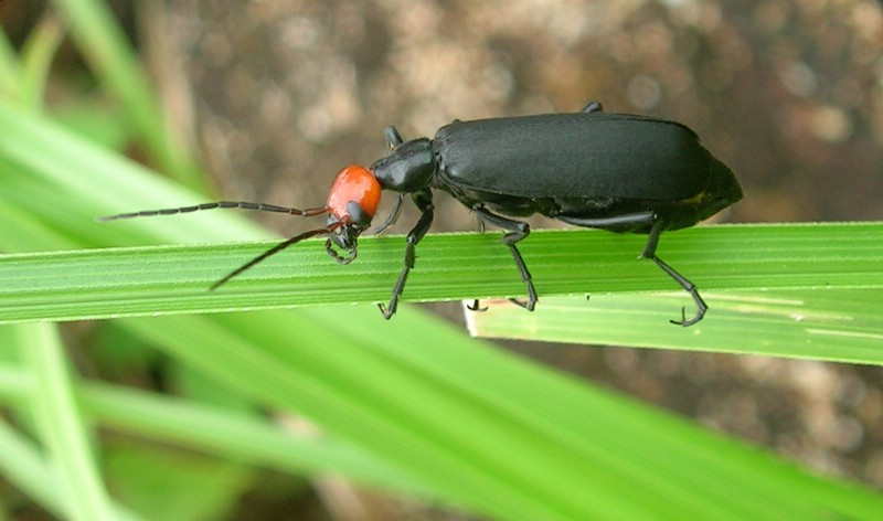 Meloid beetle at Talakaveri, Coorg, India (Epicauta sp.)